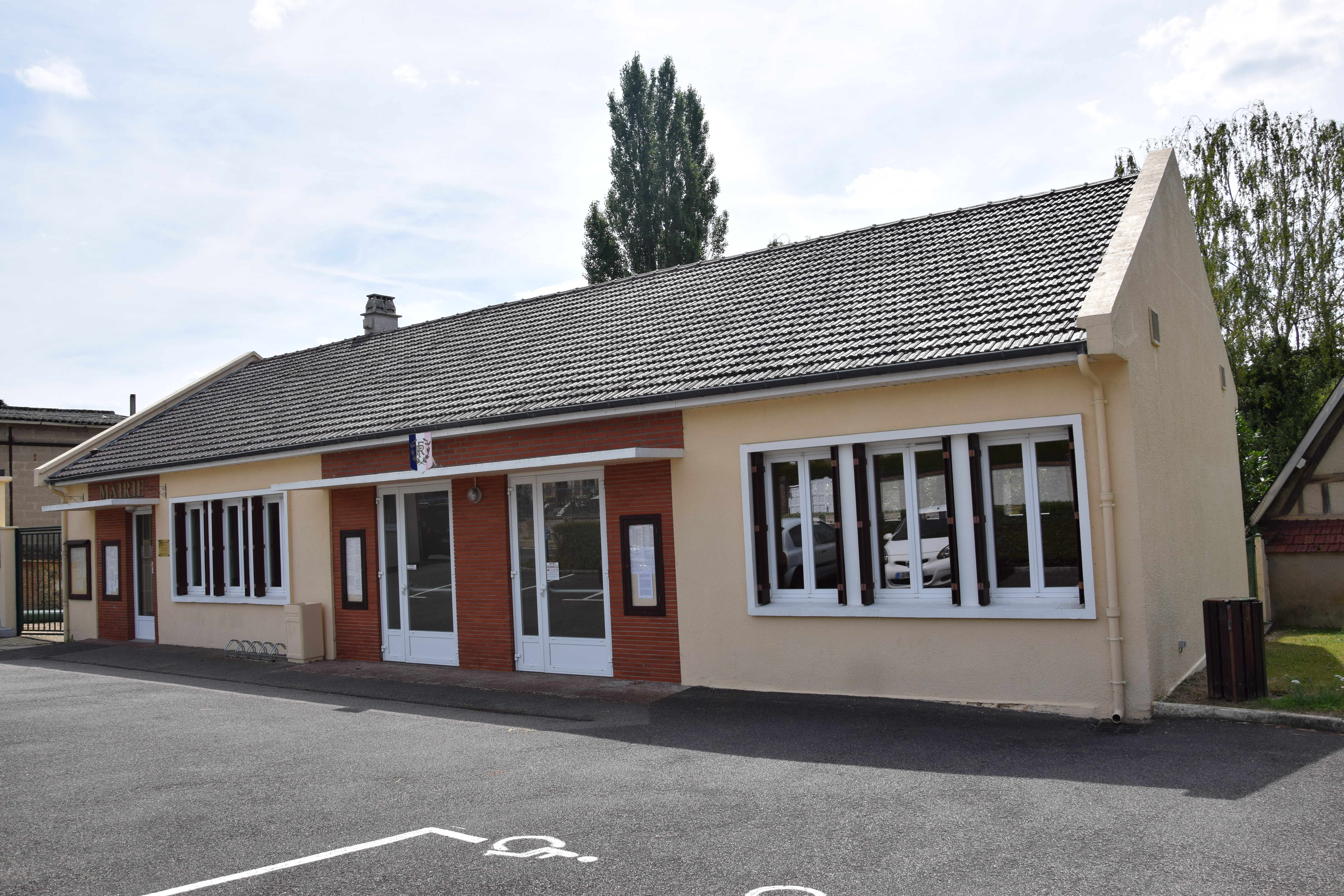 Talmontiers